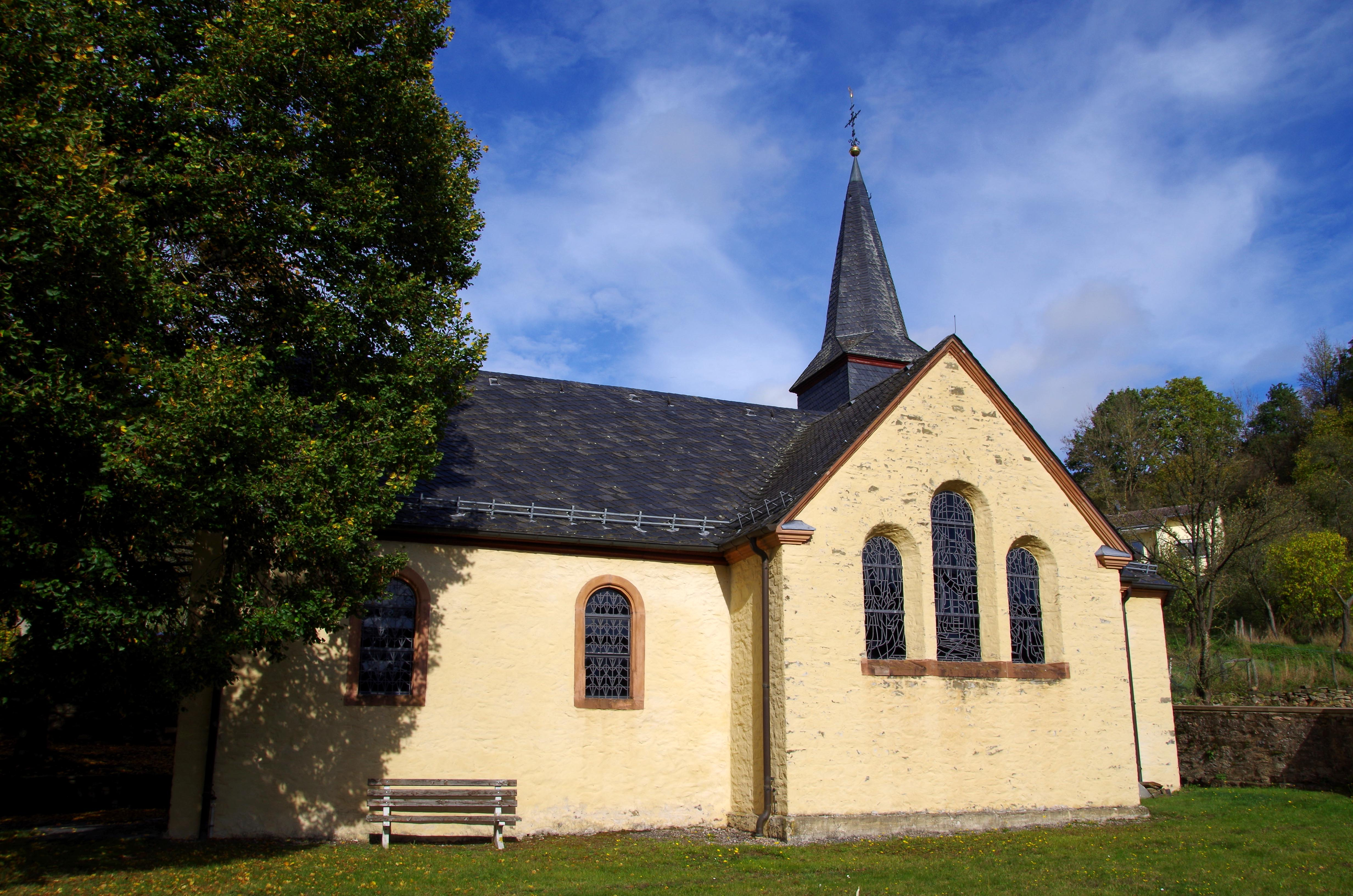 Kreuzerhöhungskapelle Holzmühlheim, Südseite